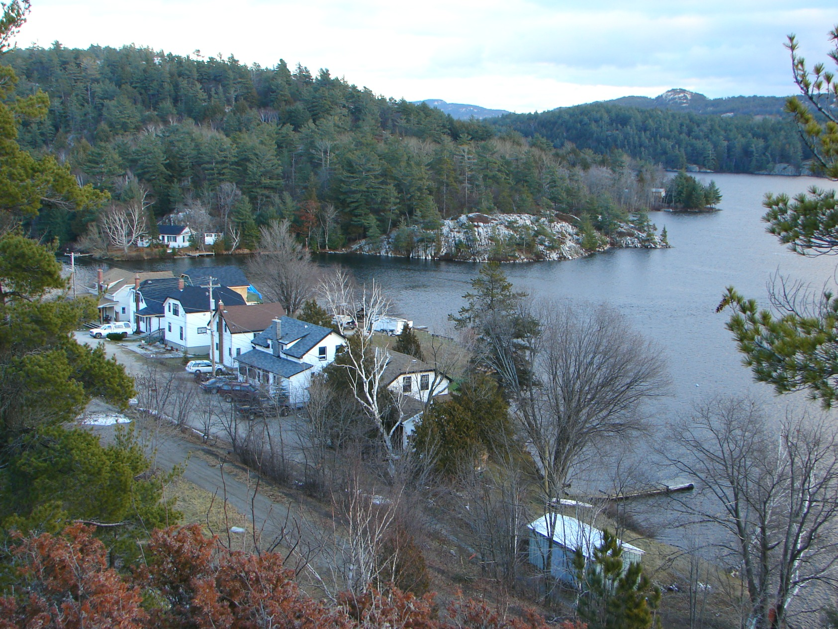 Willisville, Ontario, Canada